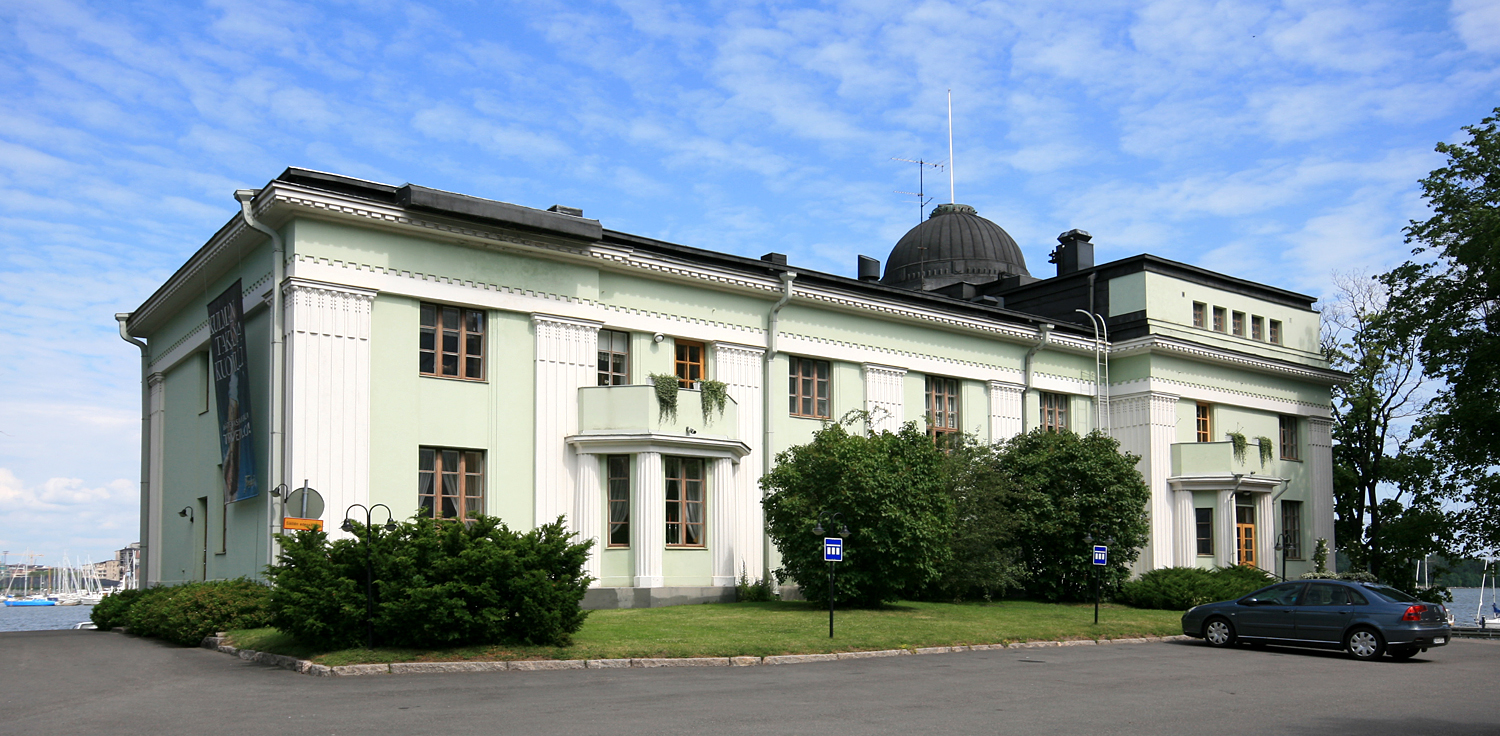 Katajanokan kasino, Helsinki. Built 1911.